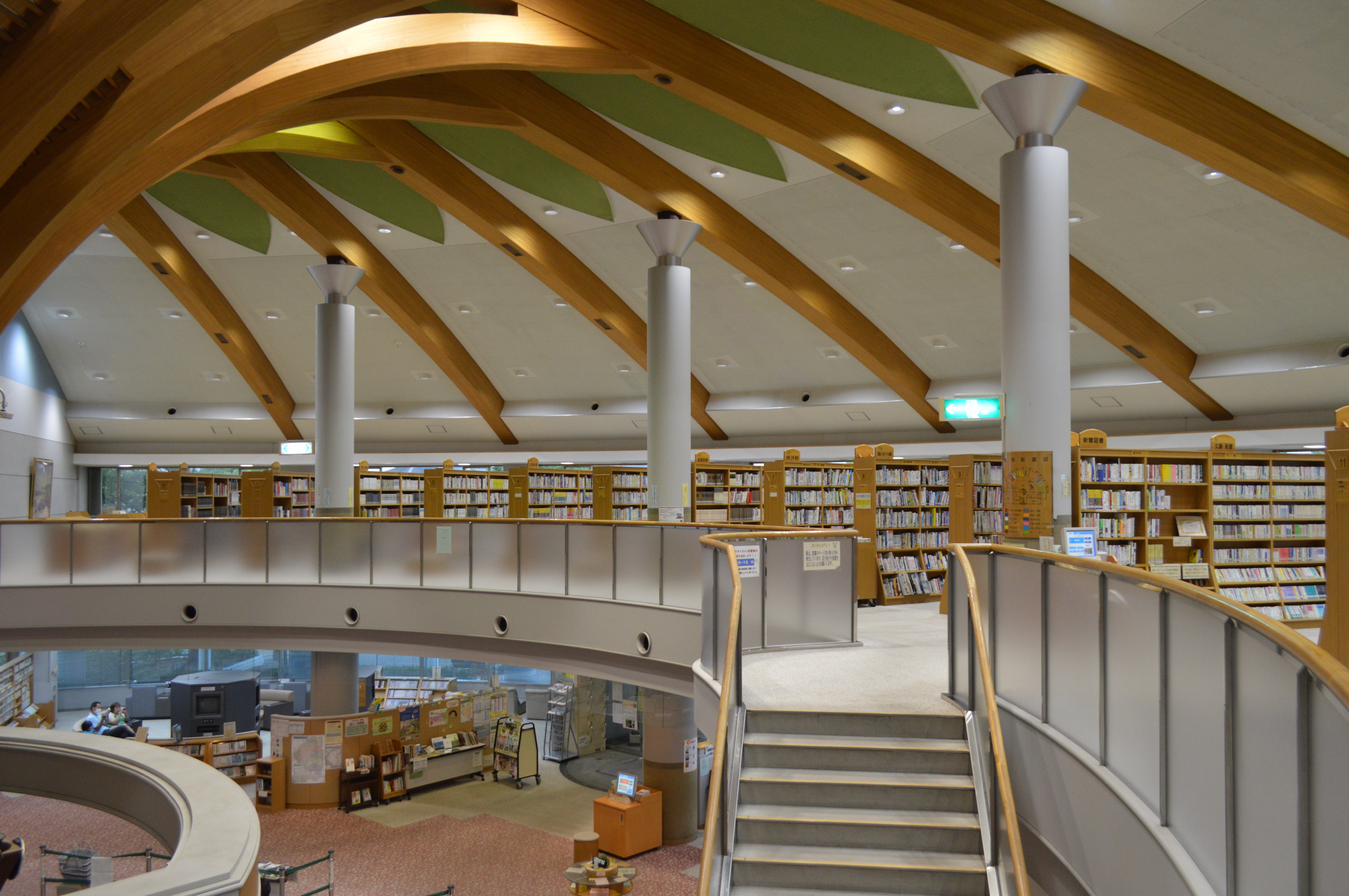 愛知県知多郡の東浦町中央図書館。2階。